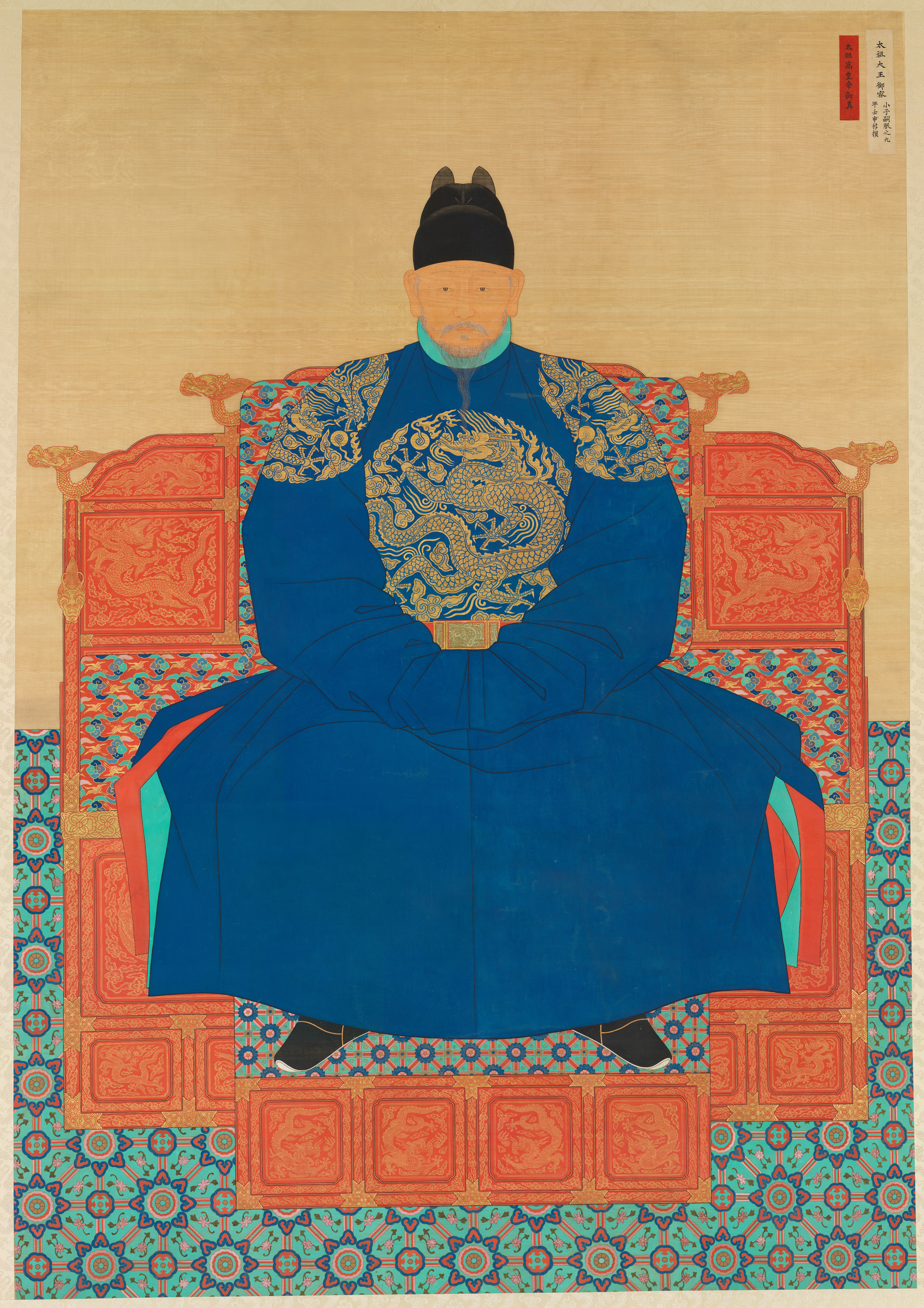 朝鮮王朝開國國王